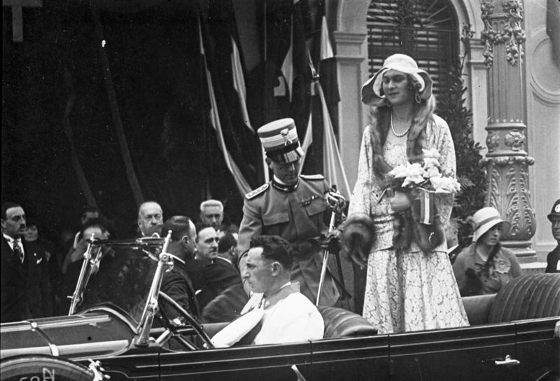 Der Prinz von Piemonte und Die Prinzessin bei einem Besuch in Mailand ! Unsere Aufnahme zeigt die Ankunft des italienischen Kronprinzenpaares in Mailand. Information added by Wikimedia users.